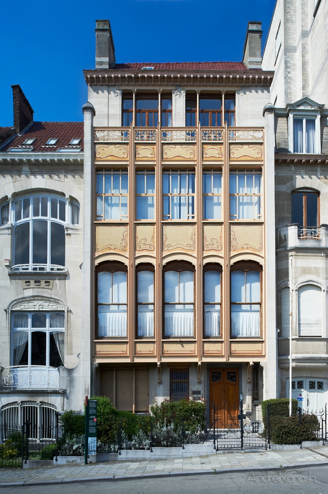 Hotel van Eetvelde, Victor Horta Unknown hotel van eetvelde, victor horta